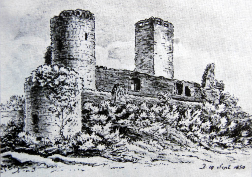 Die Heppenheimer Starkenburg auf einer Illustration aus dem Jahre 1850